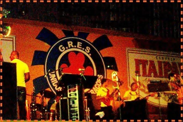 Banda Brasil Show na Unidos de Três Corações, em Nova Iguaçu.